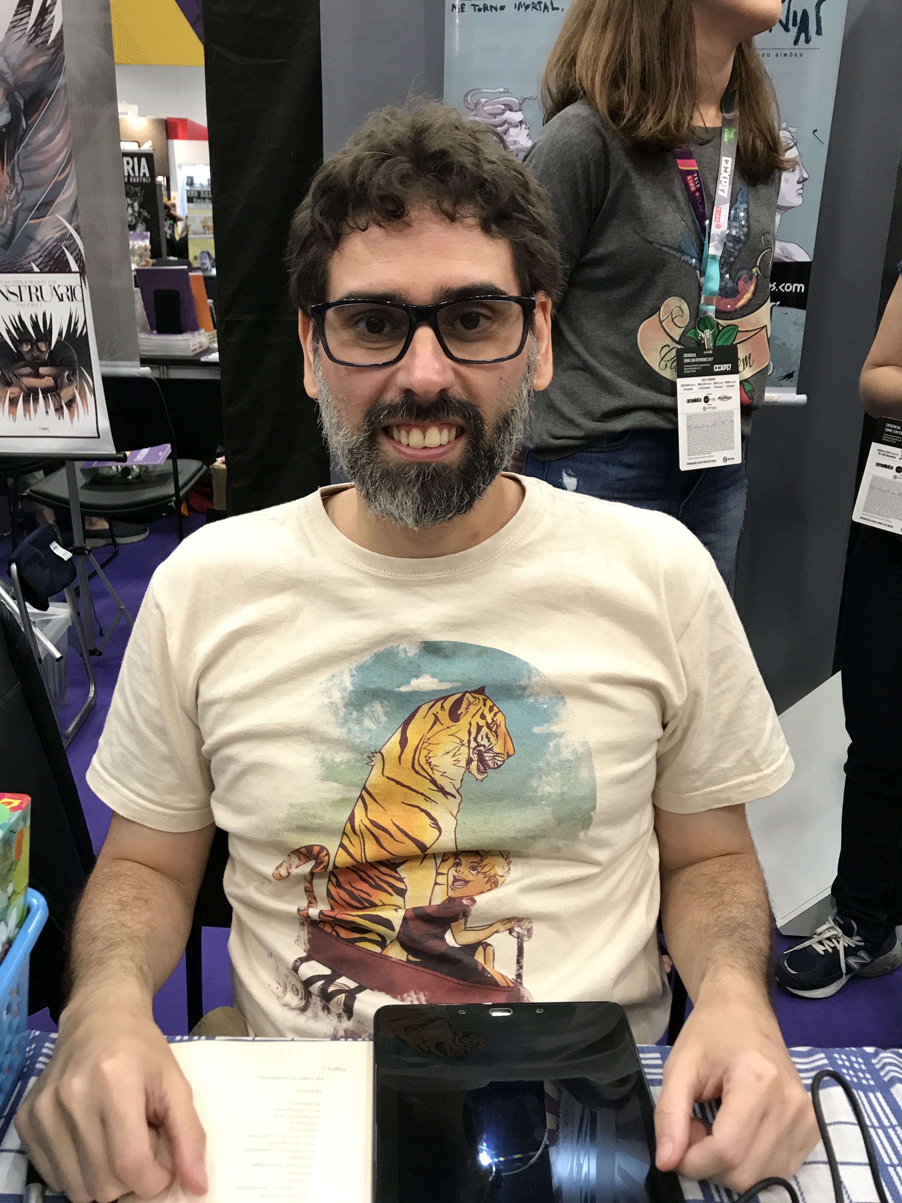 Artista Cadu Simões na edição de 2017 da Comic Con Experience